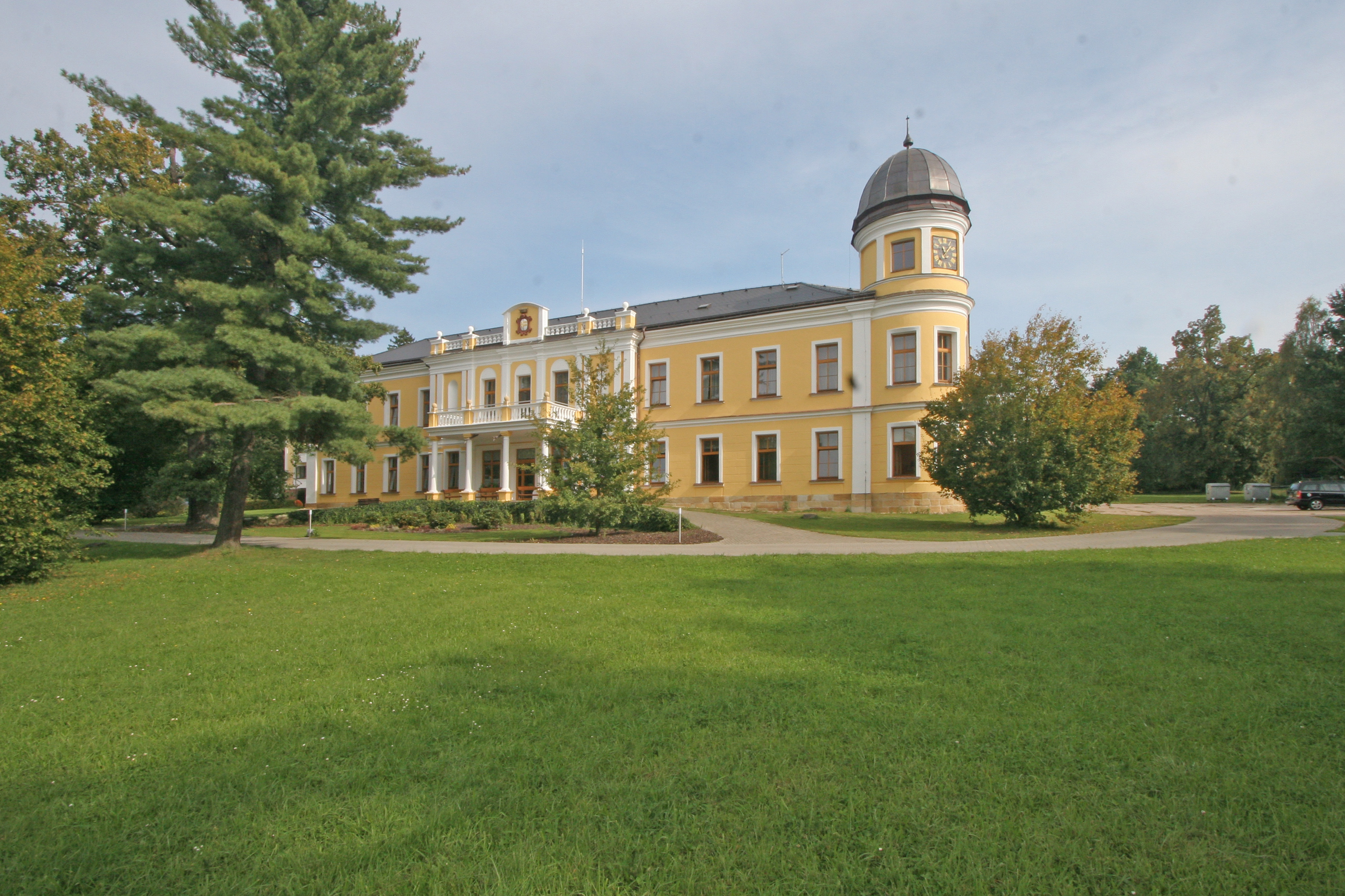 Pseudorenesanční zámek z roku 1875 v Chotělicích